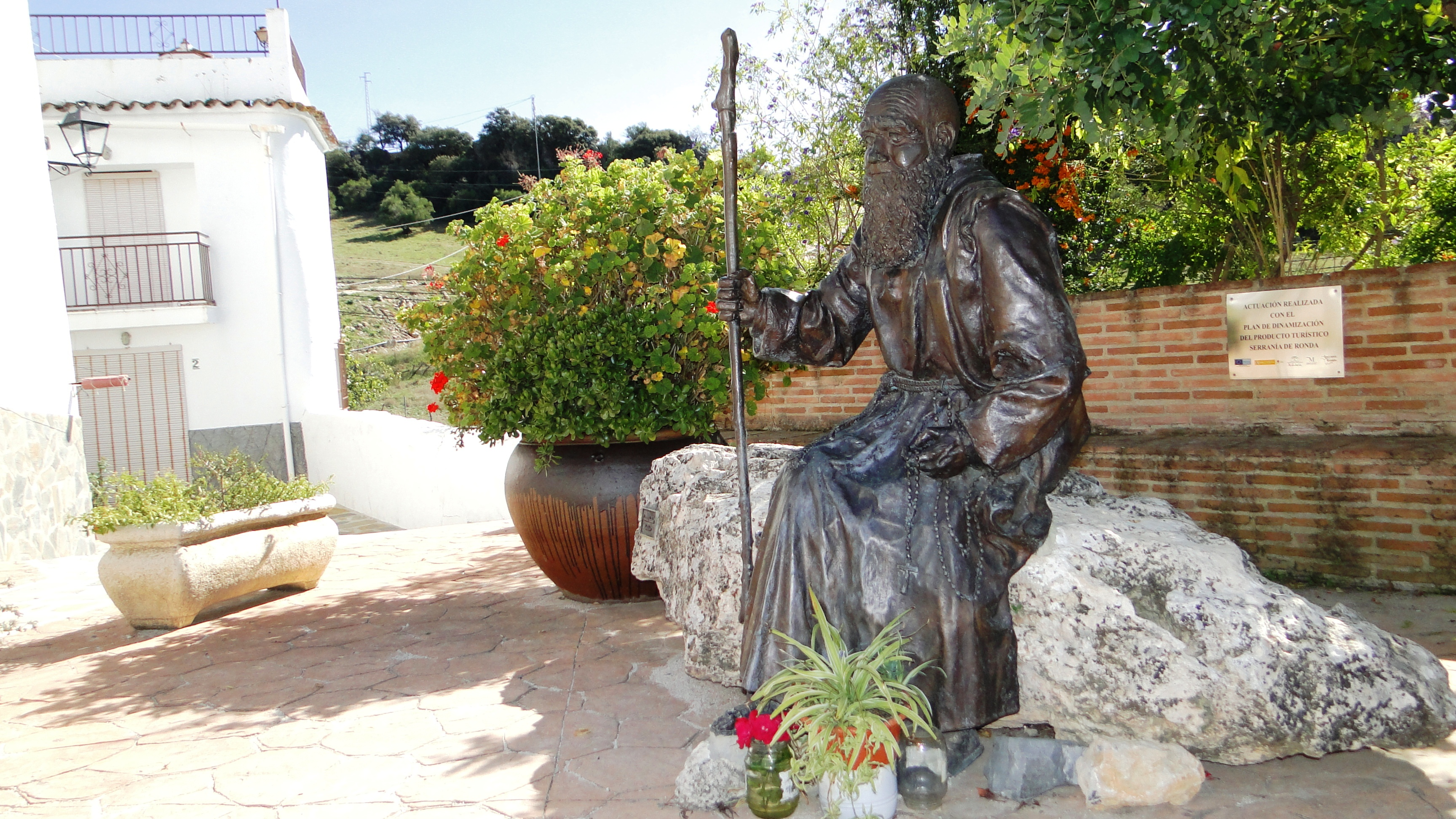 Monumento a Fray Leopoldo en Alpandeire (Málaga). Valle del Genal.